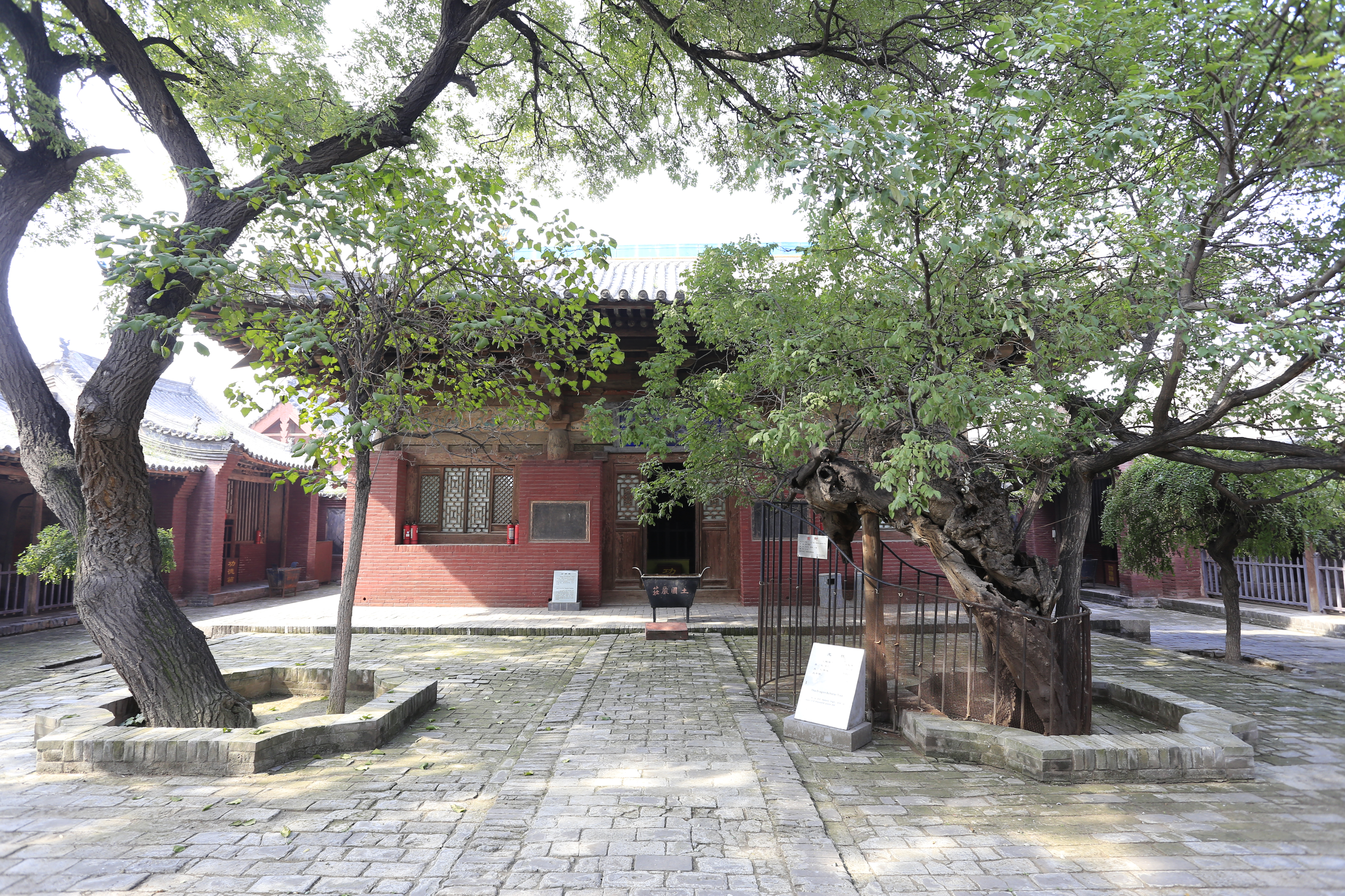 平遥镇国寺 —— 万佛殿